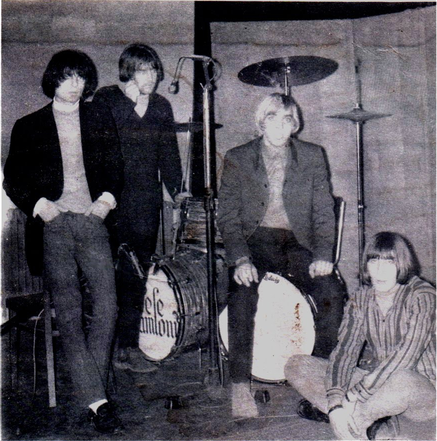 Skupina Kameleoni na zadnji strani plošče Sunny Cry.